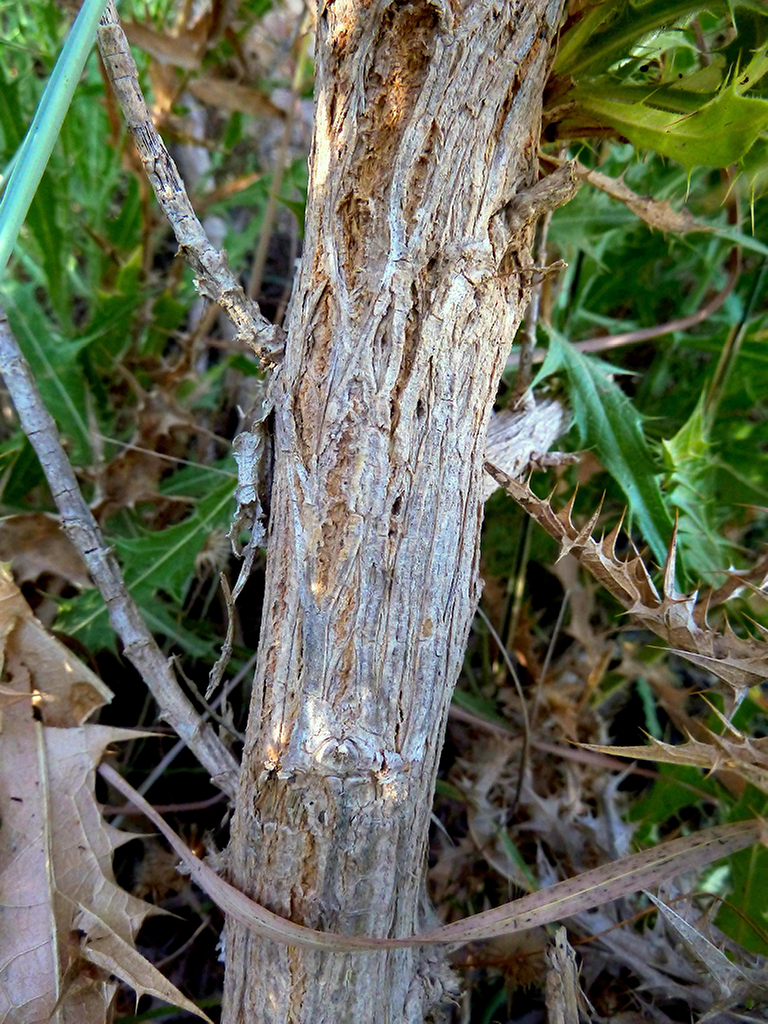 Carthamus arborescens (Cardo cabrero) : Detalle del tallo de base leñosa - Camino de la Azarbe de Patricio Este, Albatera (Alicante, España).